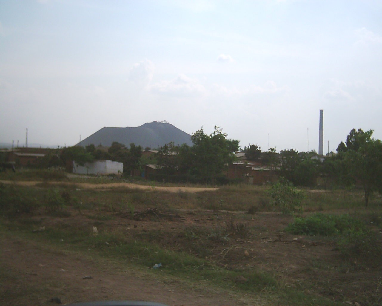 Terril de la GECAMINES de Lubumbashi